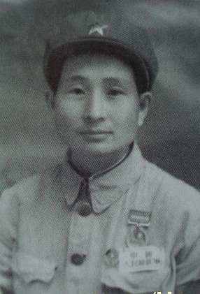 乔利程肖像照